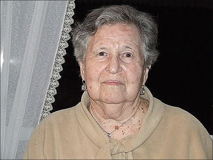 Портрет Доры Моисеевны Штурман сделанный мною, её дочерью Татьяной Будорагиной в Израиле, пос. Кфар-Йона. 2010 год.